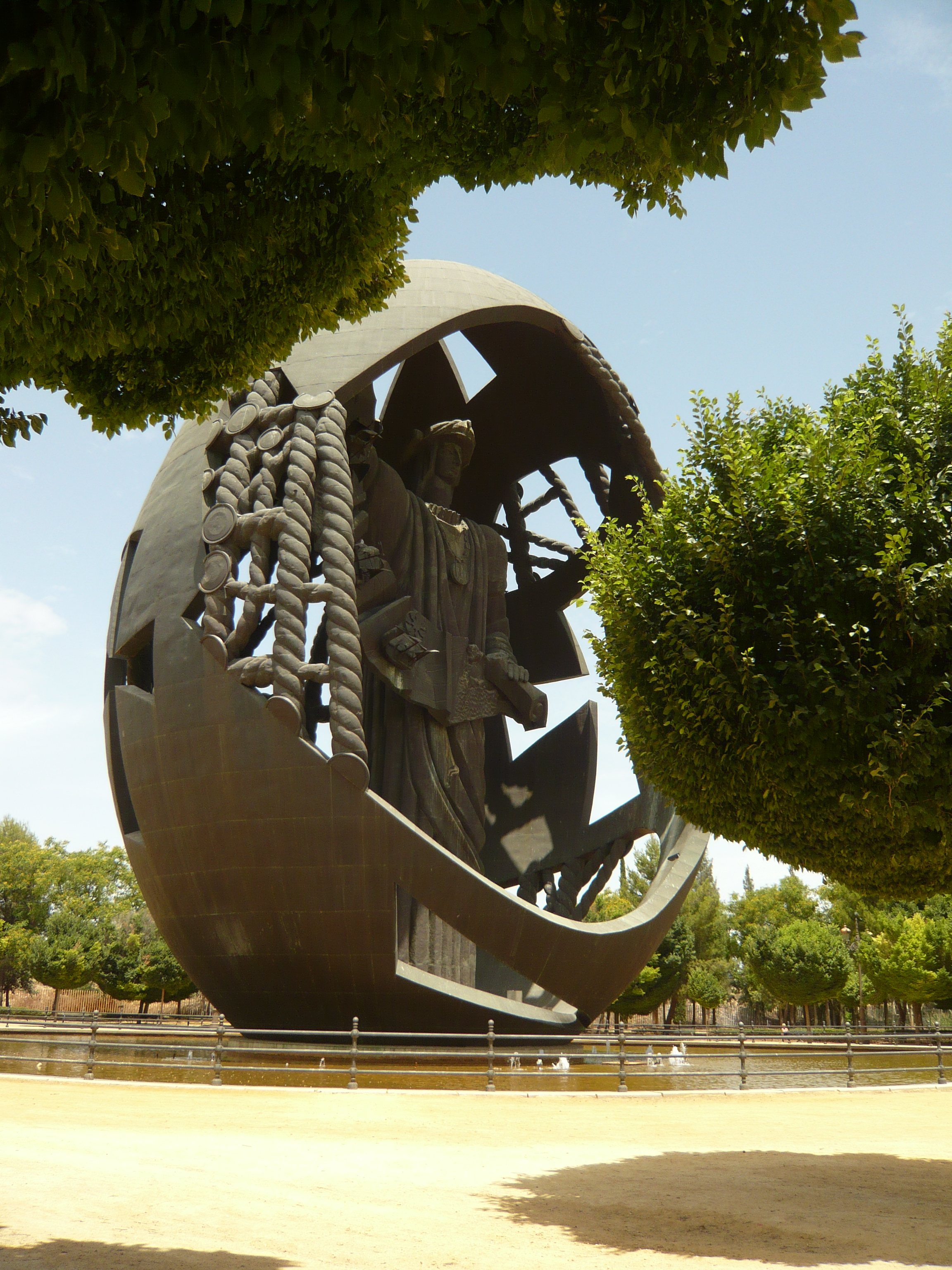 Seville, Sevilla, Spain